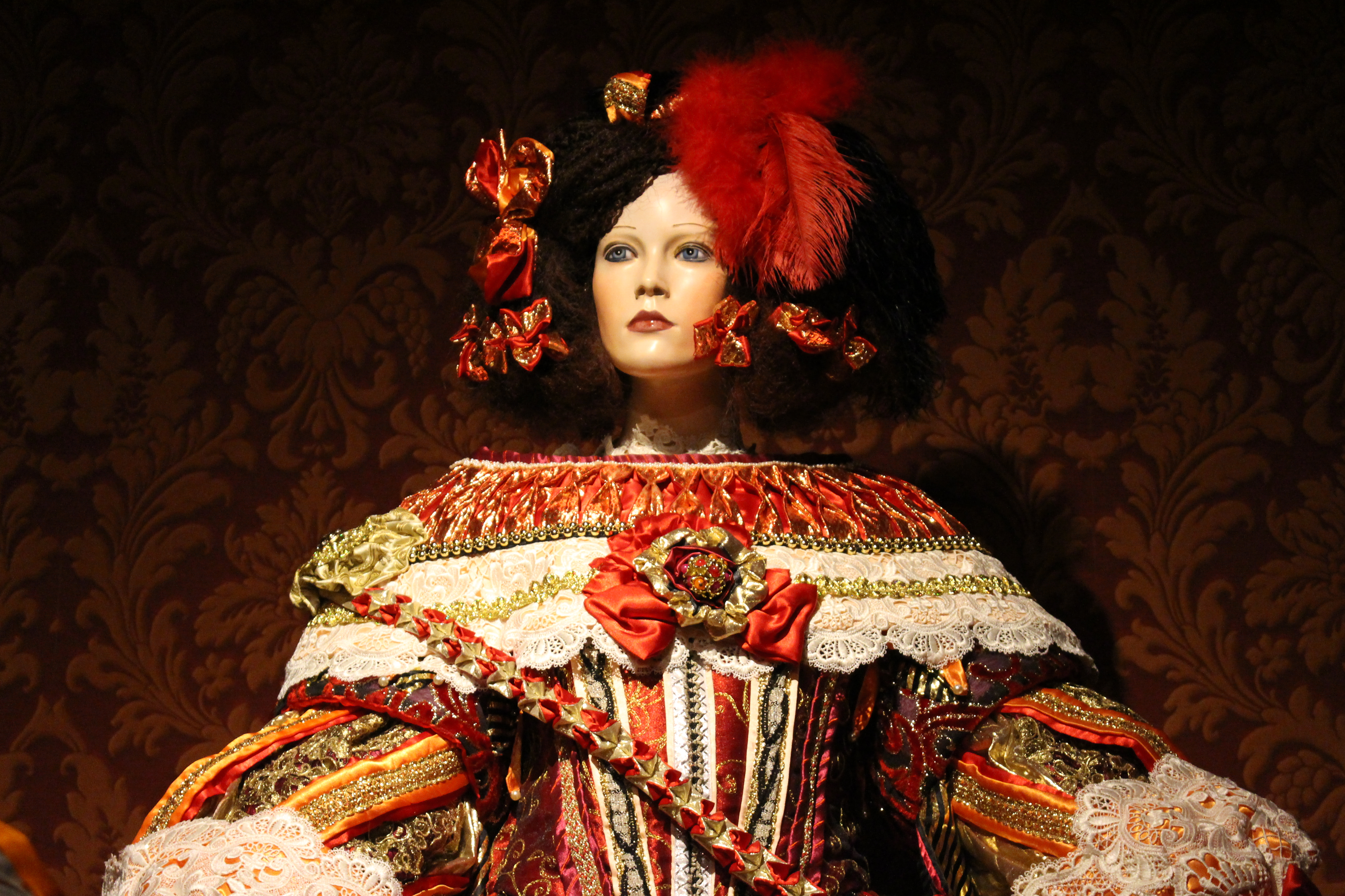 Die Kostueme im Gewandhaus Museum Inneringen wurden von Ilse Wolf und Katja Morrison gefertigt. Urheberrecht bei Ilse Wolf und Katja Morrison. Bilddatei von Katja Morrison The costumes in the Gewandhaus Museum Inneringen have been created by Ilse Wolf and Katja Morrison, all rights reserved. Copyright by Ilse Wolf and Katja Morrison. Image by Katja Morrison